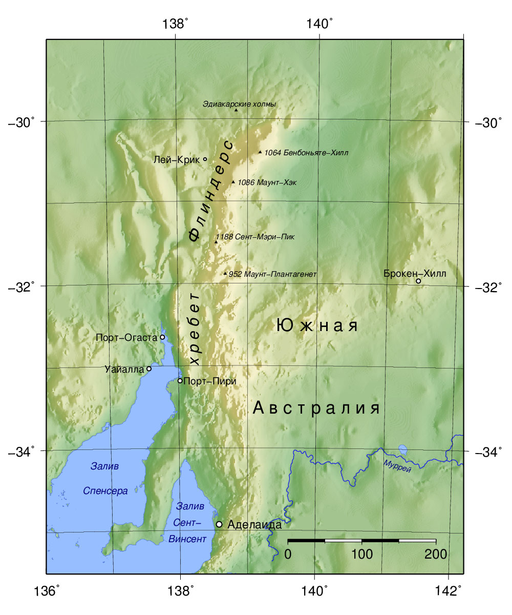 Хребет Флиндерс в Южной Австралии. В северной оконечности хребта отмечены Эдиакарские холмы, место наиболее разнообразных и хорошо сохранившихся палеонтологических находок докембрийской фауны.